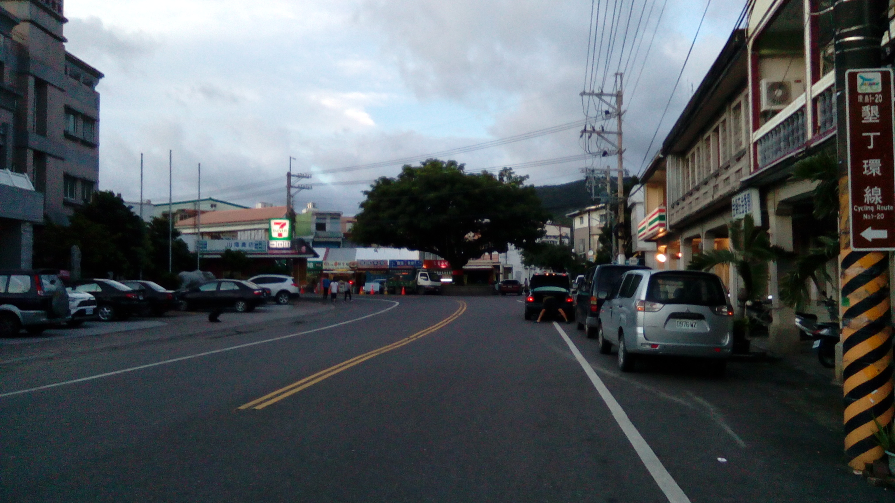 200縣道上